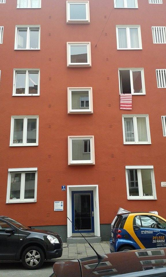 Dom w którym mieszkał Stepan Bandera. Kreittmayrstraße 7 Monachium